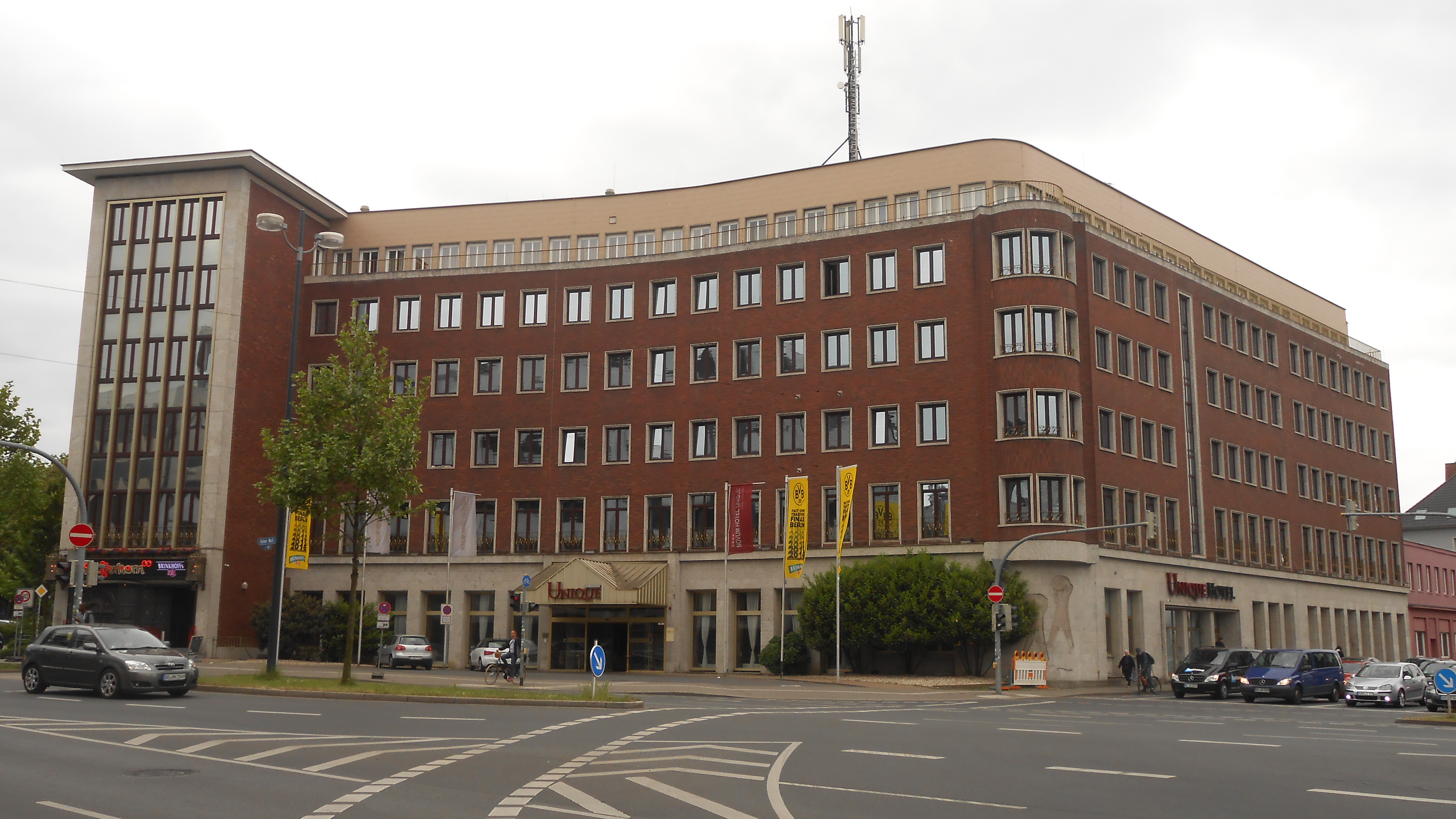 Das Novum Hotel Unique Dortmund am Hohen Wall / Ecke Rheinische Straße (gegenüber Dortmunder U), im ehemaligen Verwaltungsgebäude der Dortmunder Union, später Brau und Brunnen.